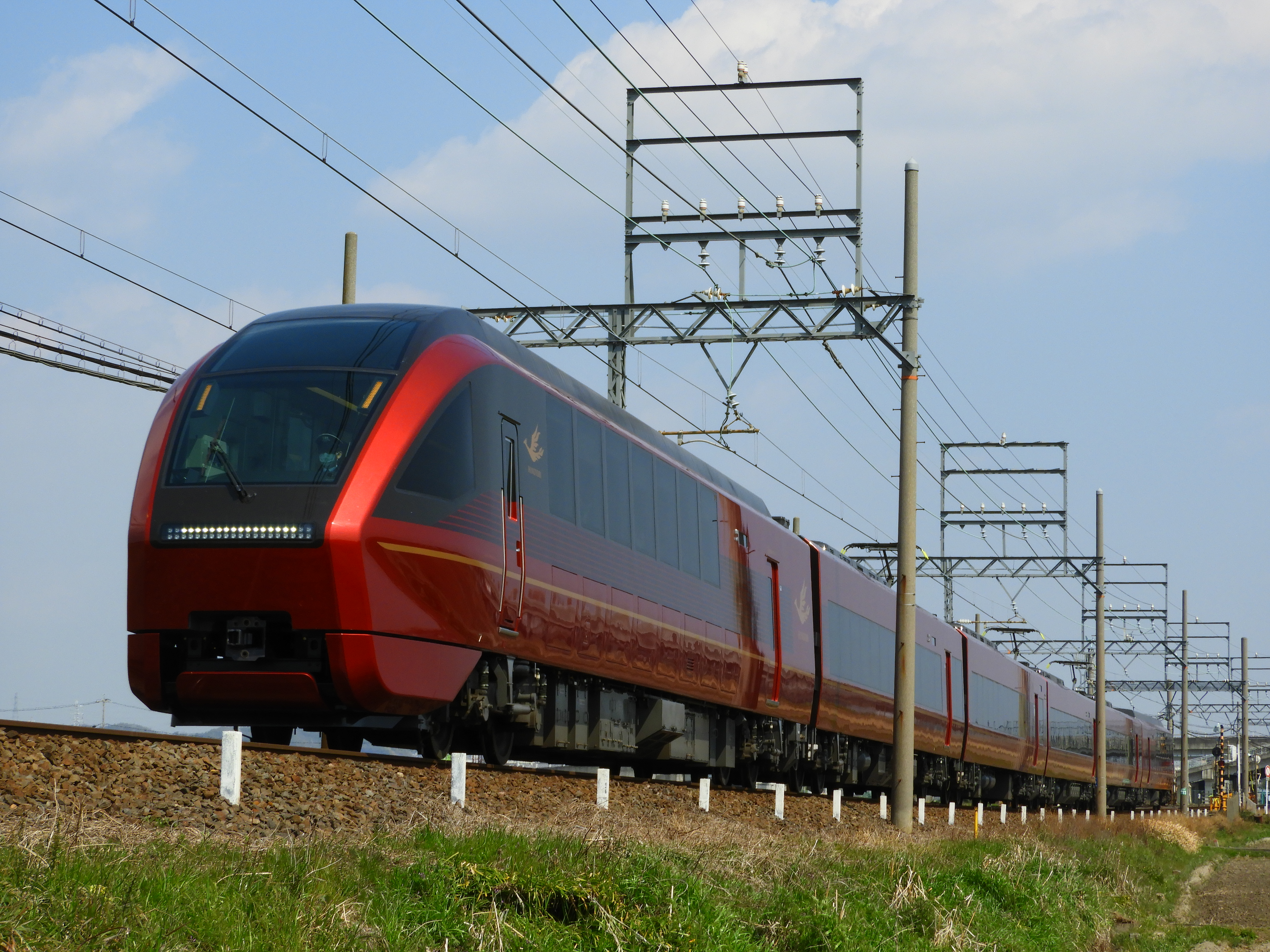 近鉄80000系 特急「ひのとり」大阪難波行き